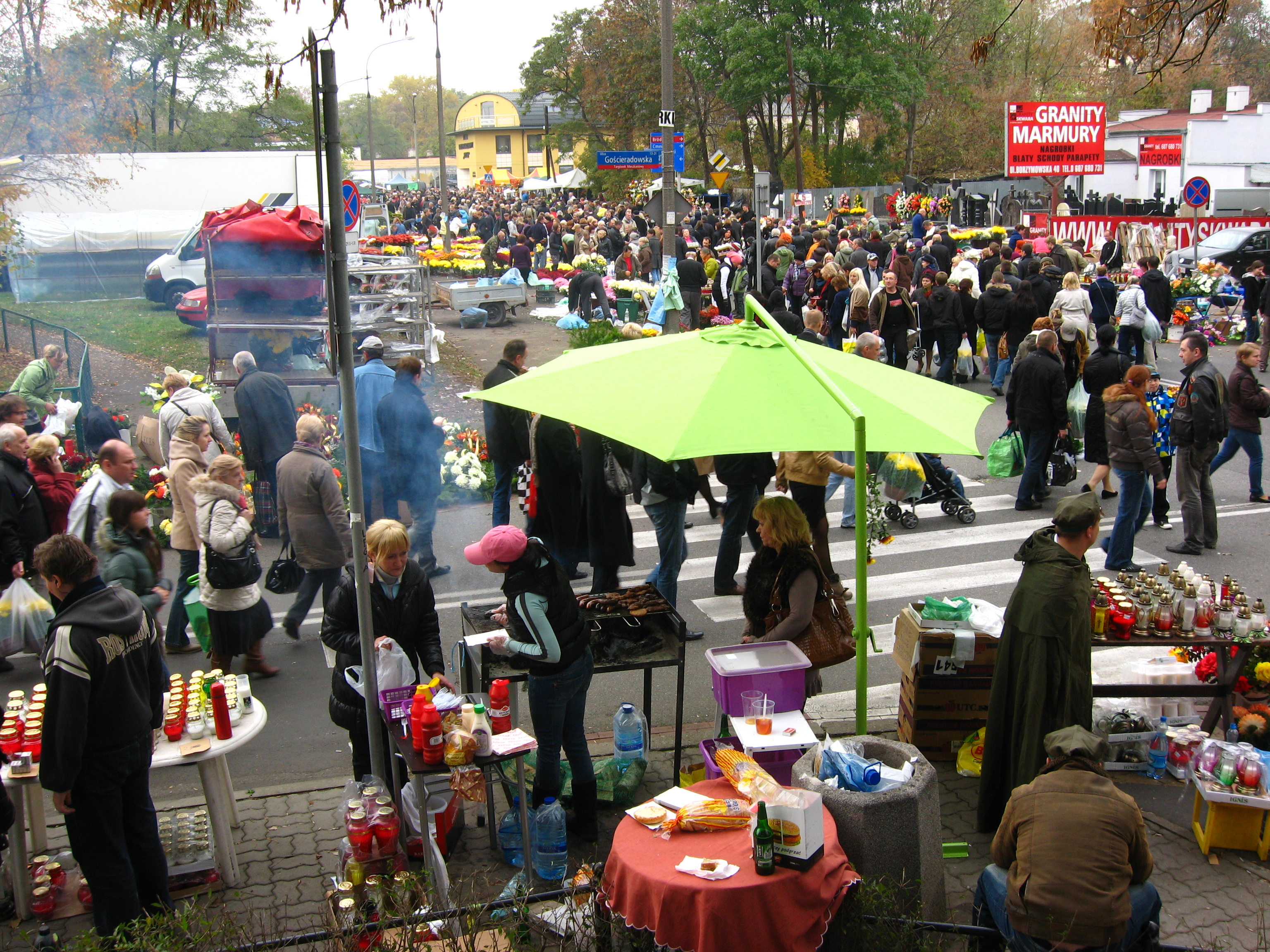 Tłum zmierzający na Cmentarz Bródnowski. Róg ulic Borzymowskiej i Gościeradowskiej na warszawskim Targówku.